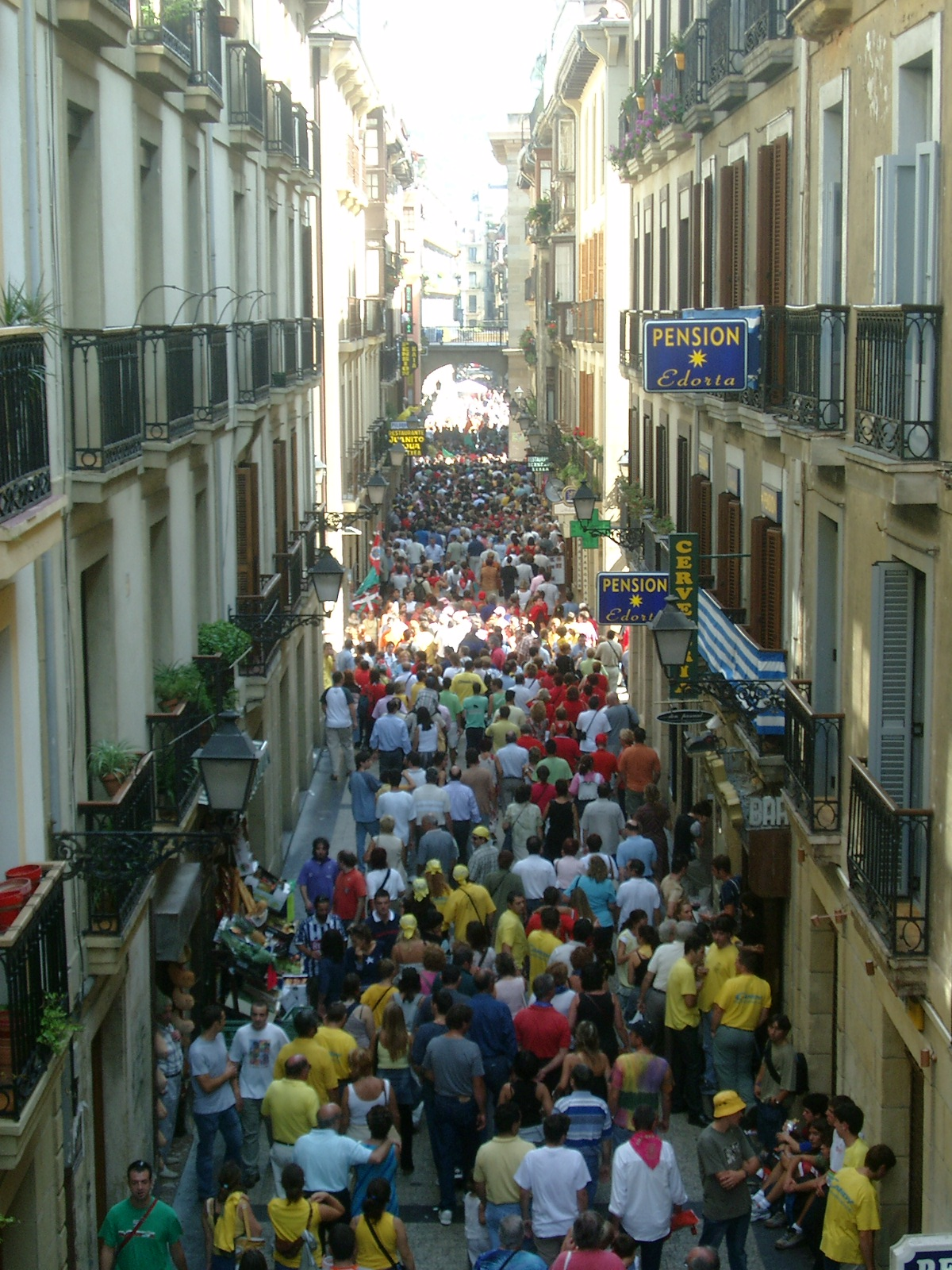 Alde Zaharreko Portu Kalea Kanpandegi kaletik ikusia Estropadak diren egun batean. nik neuk egindako argazkia